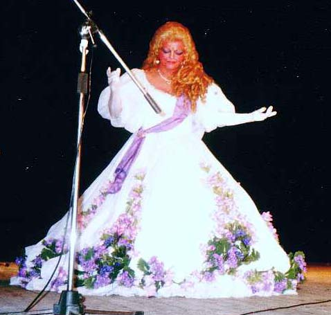 Violetta Villas, właściwie Czesława Cieślak (ur. 10 czerwca 1938 w Liège w Belgii) - polska piosenkarka, aktorka, kompozytorka, autorka tekstów. Jej głos jest charakteryzowany jako sopran koloraturowy o rozszerzonej skali, obejmującej 4 oktawy.